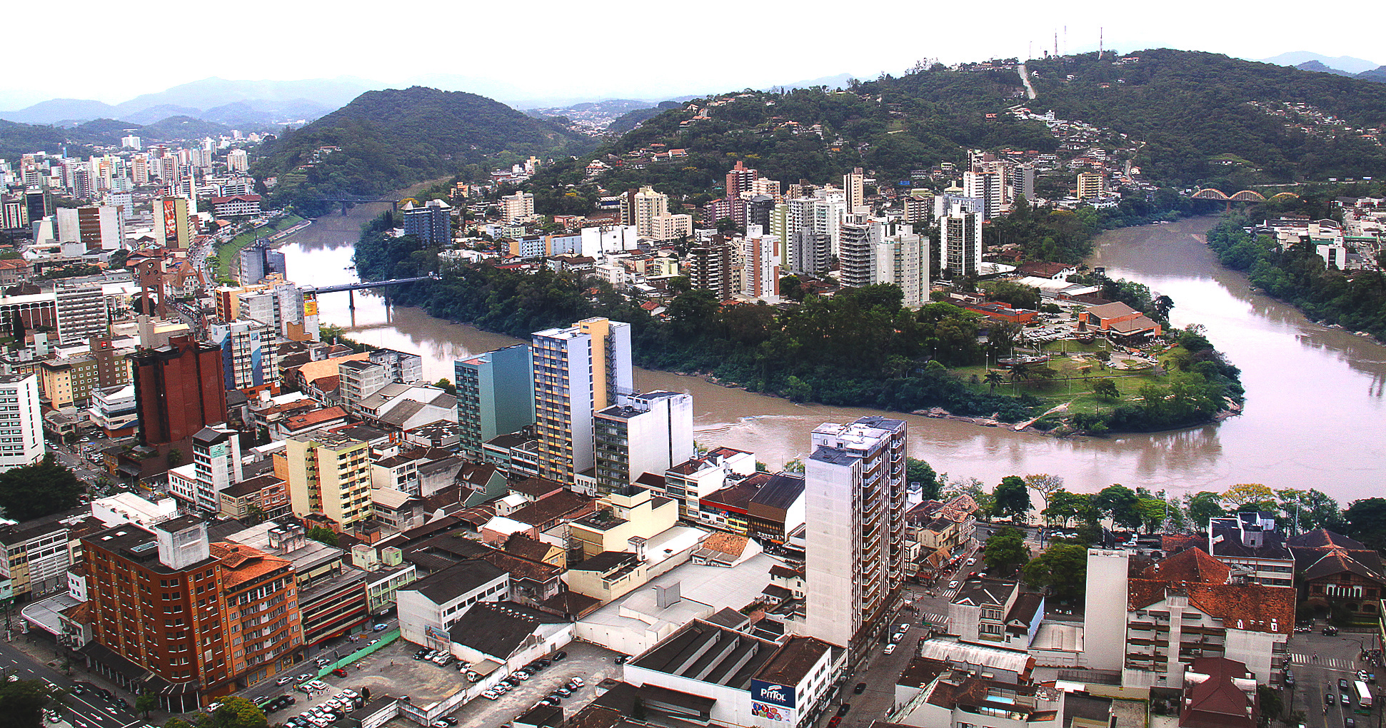 Foto aérea Blumenau